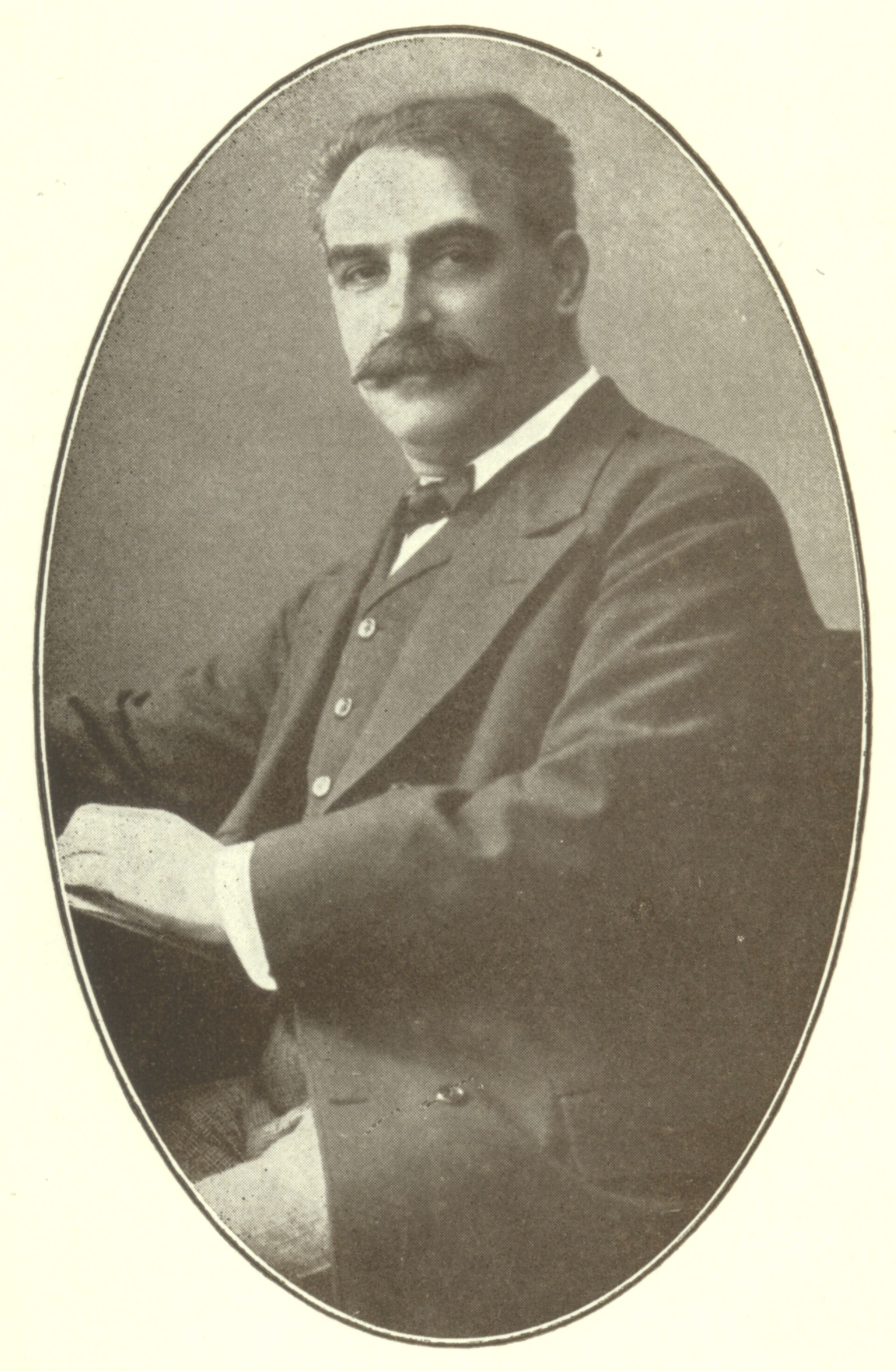 Poträt des Konzertmeisters Professor Bernhard Dessau aus einem Konzertprogramm von 1917